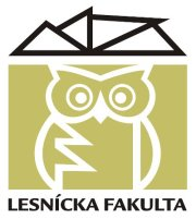 Logo Lesníckej Fakulty